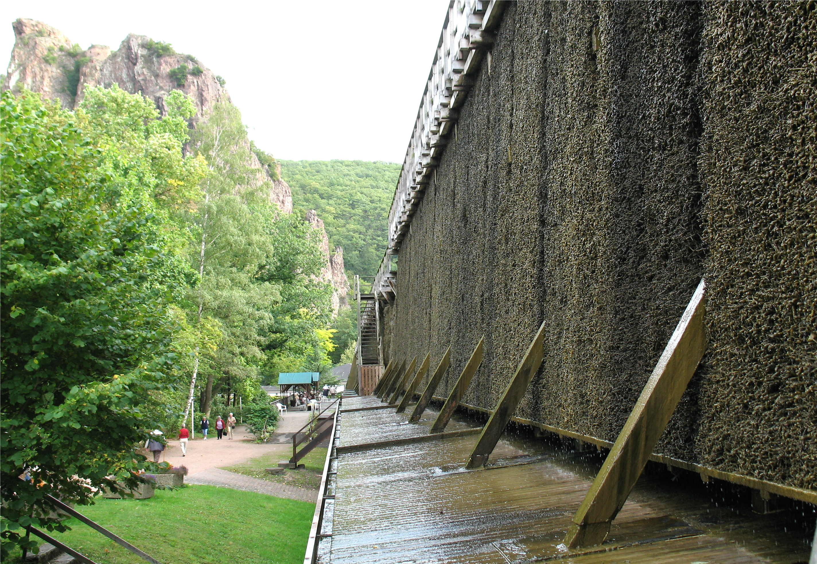 Gradierwerk zu Bad Münster am Stein